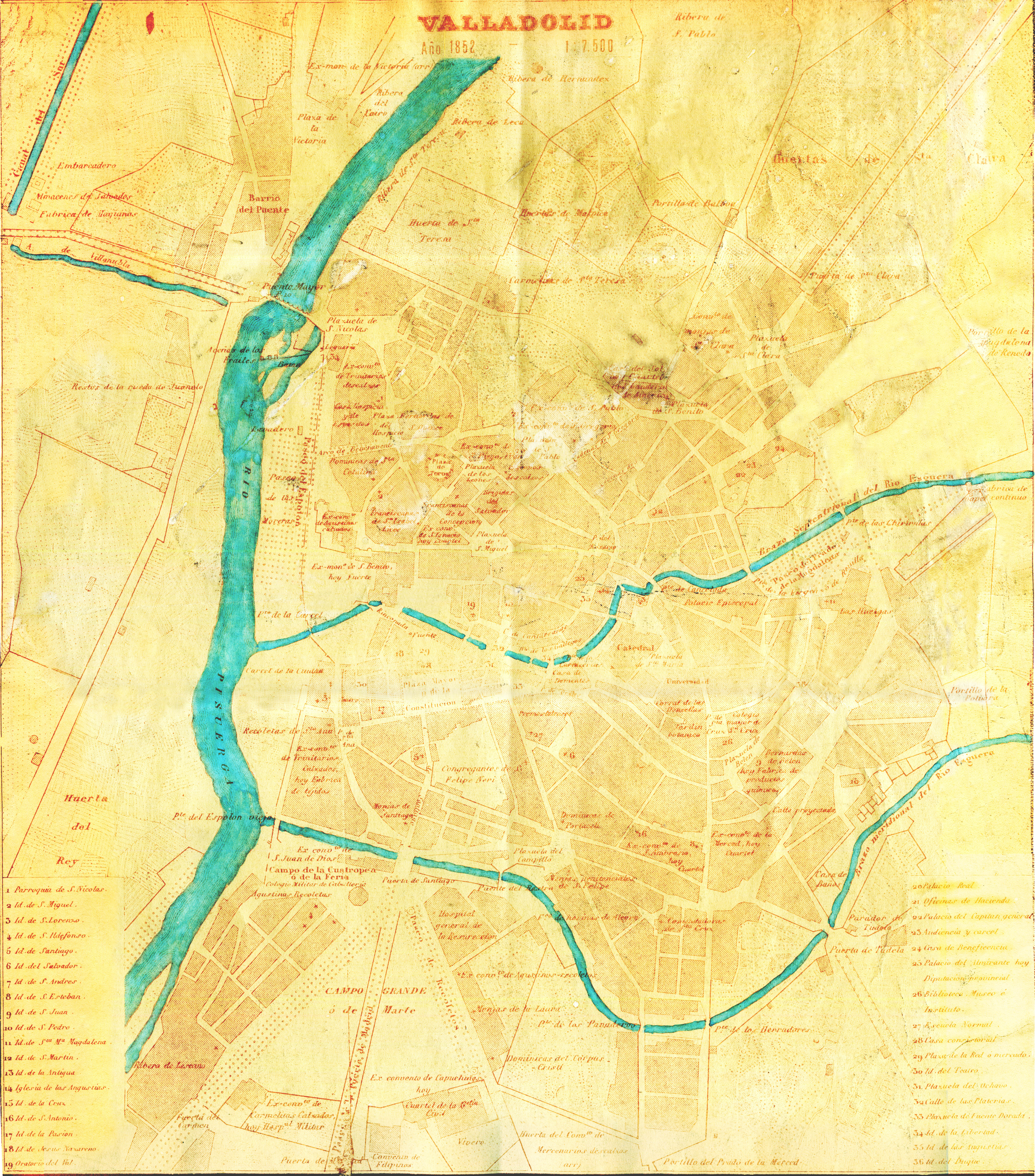 Valladolid, España. Plano de 1852 en que se ve el curso de los dos Ramales del río Esgueva.